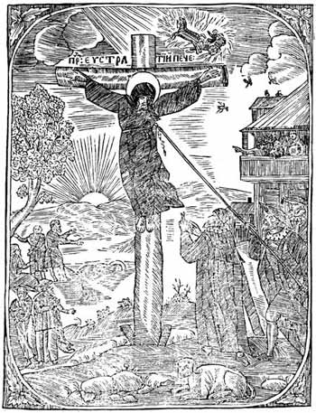 Saint Eustratius the Martyr of Kyiv Caves, Ukraine (was crucified in 1097) Євстратій преподобномученик - ? - 1097 р. Чернець Печерського монастиря. Преподобномученик. Пам'ять 11 жовтня і 10 квітня. Народився у Києві, походив із знатної родини. Роздавши своє майно, вступив ченцем до обителі прп. Антонія. Під час нападу на Печерський монастир половецького хана Боняка 20 липня 1096 р. потрапив у полон і був проданий іудею до Корсуня у Крим. Серед побратимів-християн Євстратій проповідував стійкість у вірі і закликав не боятися мучеництва, нагадуючи про обіцяне Христом вічне життя. За опір своєму поневолювачу, непохитність у вірі і проповідь мучеництва серед інших бранців, був розп'ятий на хресті на Великдень 1097 р. Висячи на хресті, мученик залишався живим ще 15 днів. Перед кончиною він передрік близьку загибель свого мучителя-іудея, що незабаром і сталося. Тіло Євстратія кинули в море, але пізніше воно знайшлося у Печерському монастирі. Мощі його спочивають у Ближніх печерах.